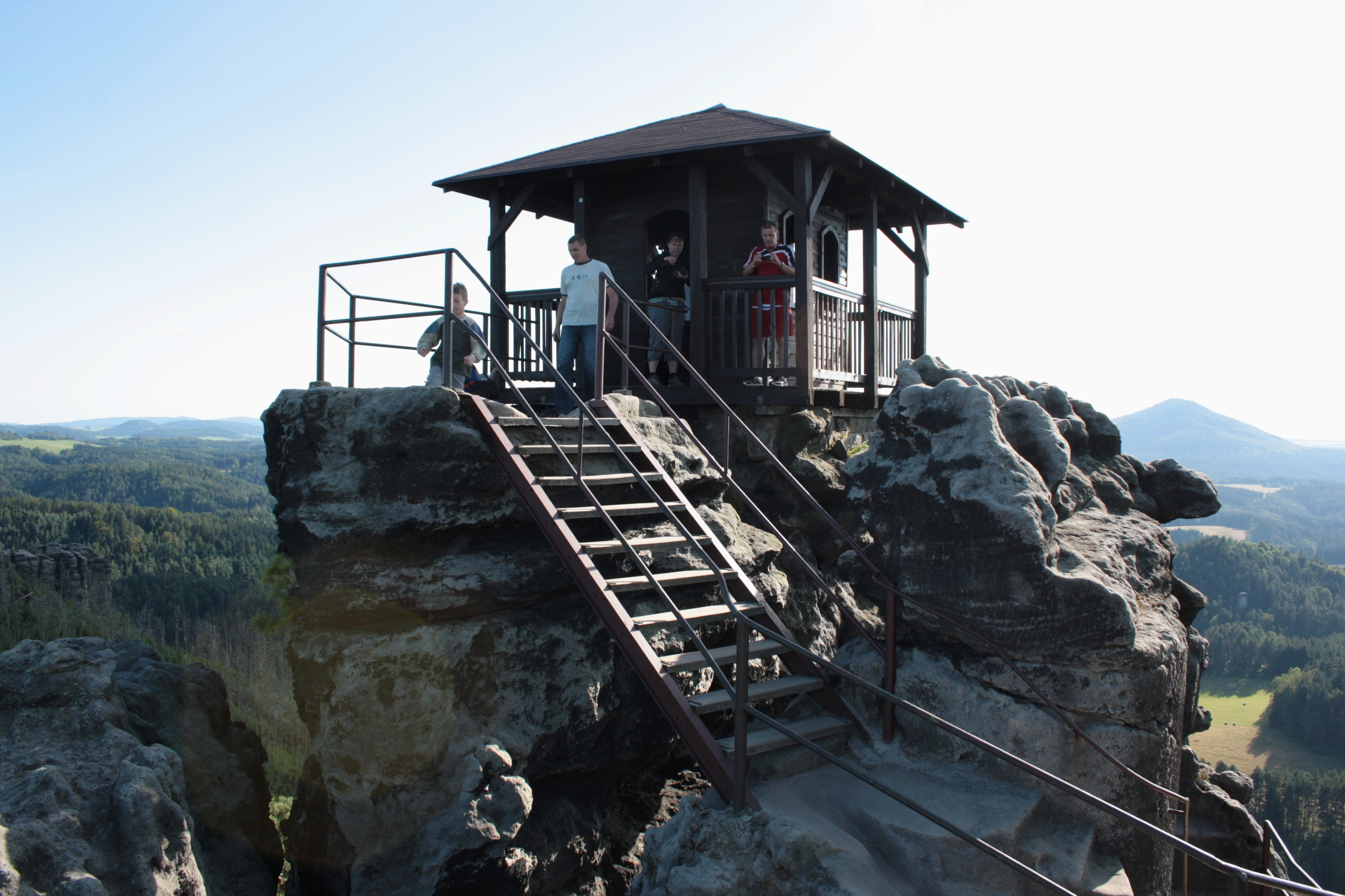 Mariina skála